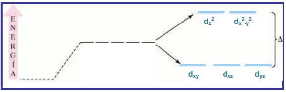 Koordinazio konposatu oktaedrikoen kristal eremuen banaketa